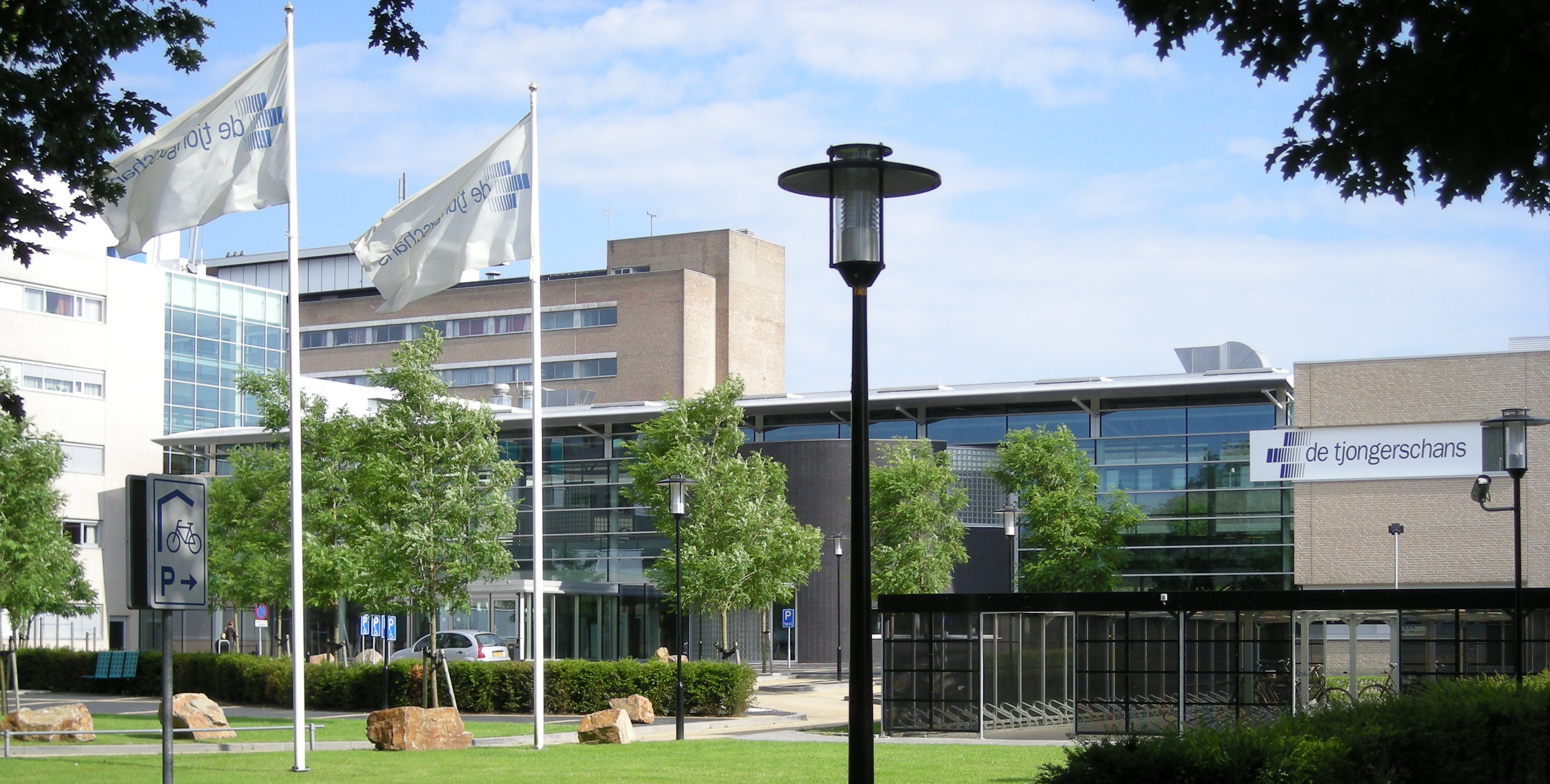 Ziekenhuis de Tjongerschans (hospital) in Heerenveen